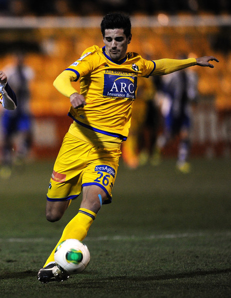 Chema Alcorcón